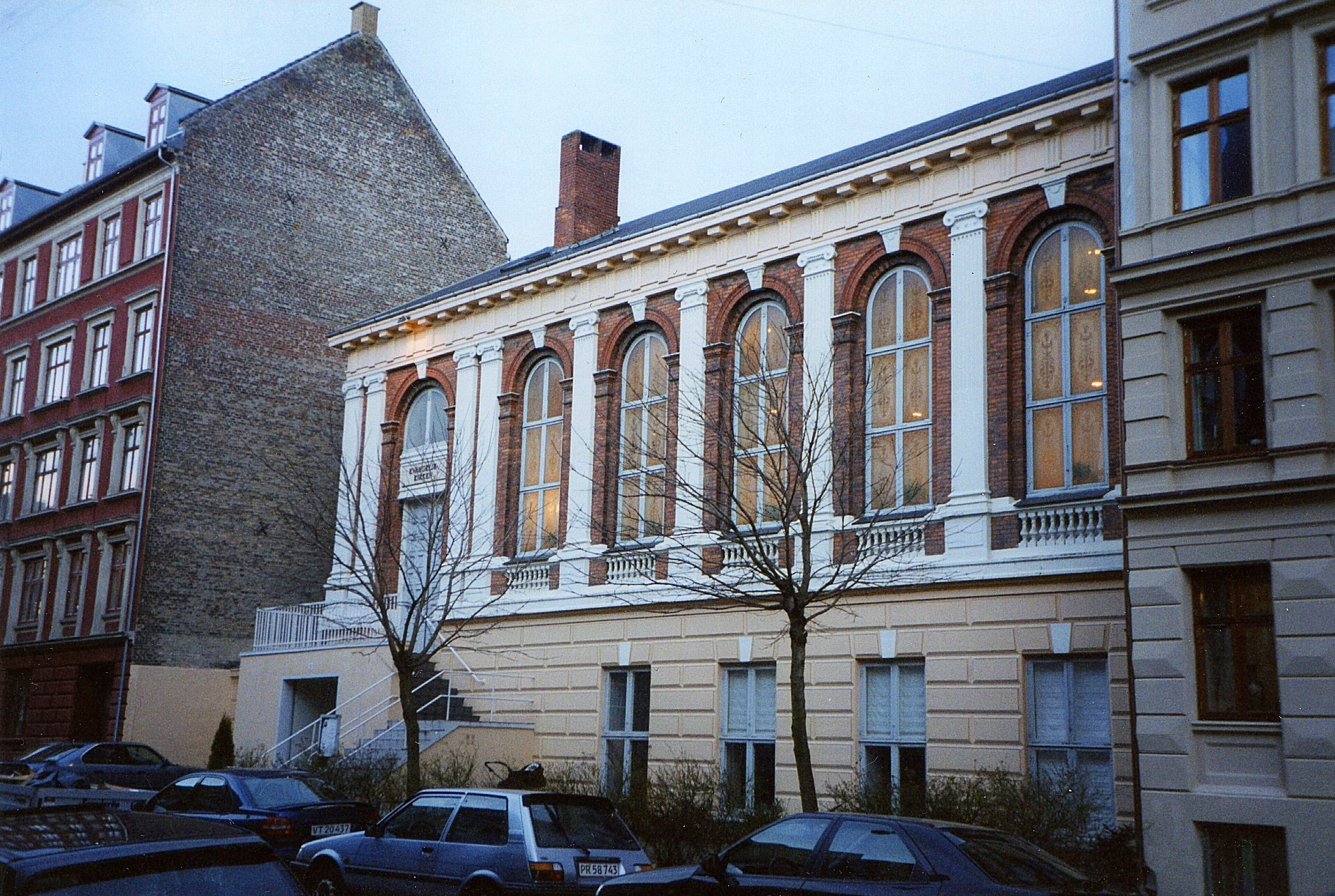 Evangeliekirken (Pinsekirke), Frederiksberg Kommune